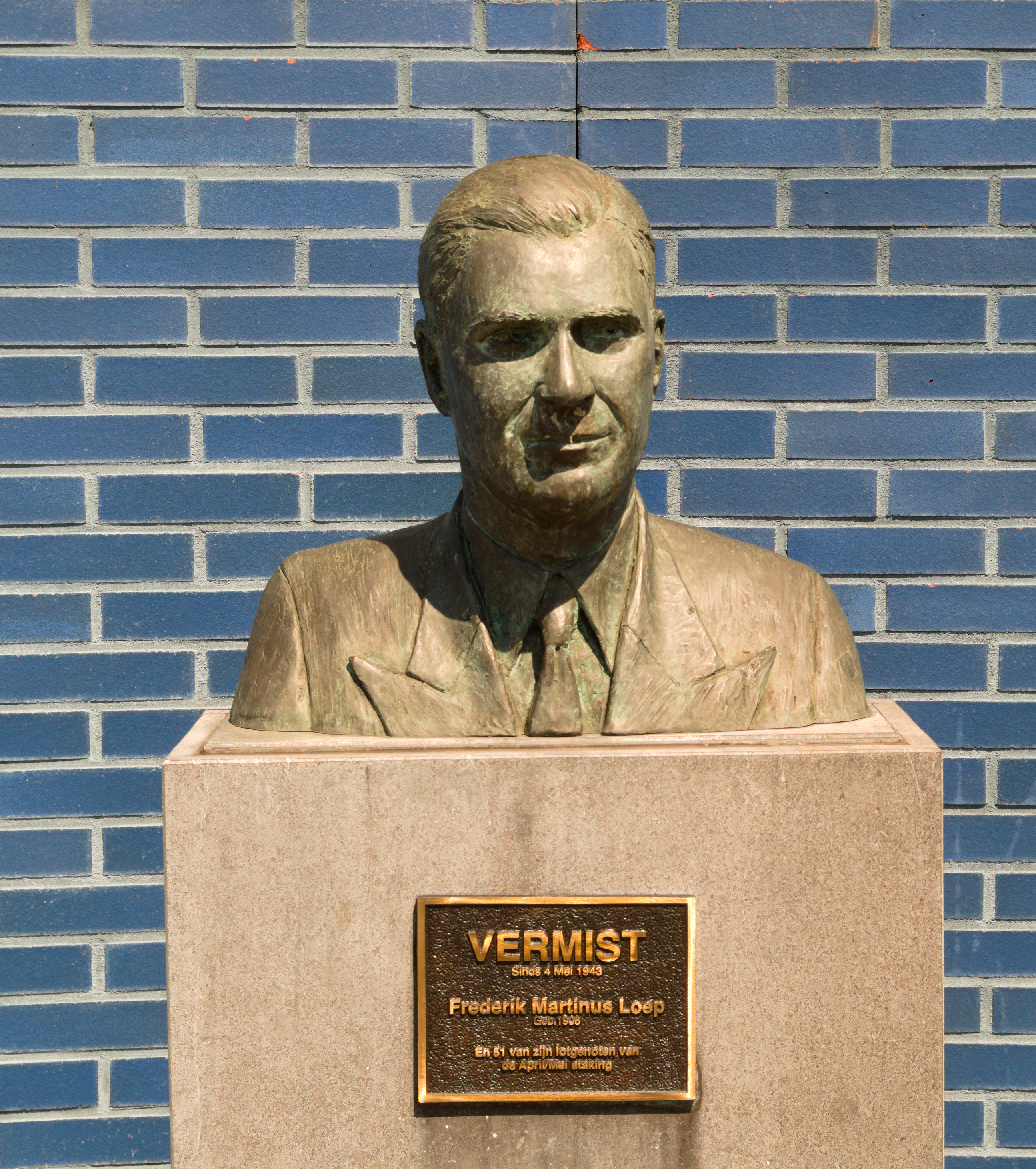 Monument Frederik Martinus Loep en 51 van zijn lotgenoten. Het beeld, gemaakt door Lia Krol, werd onthuld op 4 mei 2013 (zie verslag RTV Oost). Op de plaquette staat: Vermist Sinds 4 mei 1943 Frederik Martinus Loep Geb. 1906 En 51 van zijn lotgenoten van de April/Mei staking